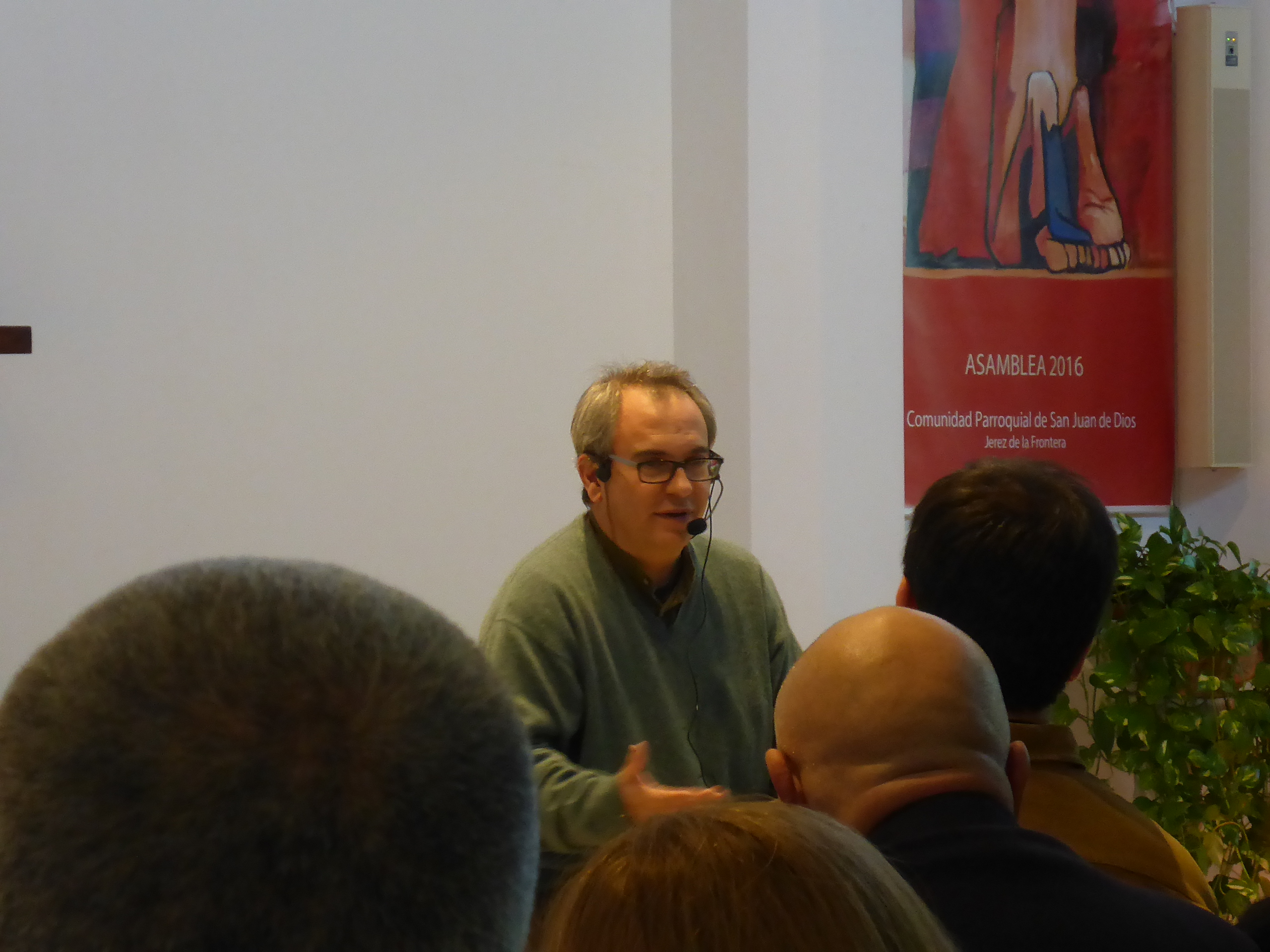 Charla de Pablo d'Ors en la Parroquia San Juan de Dios en Jerez de la Frontera (Andalucía, España)